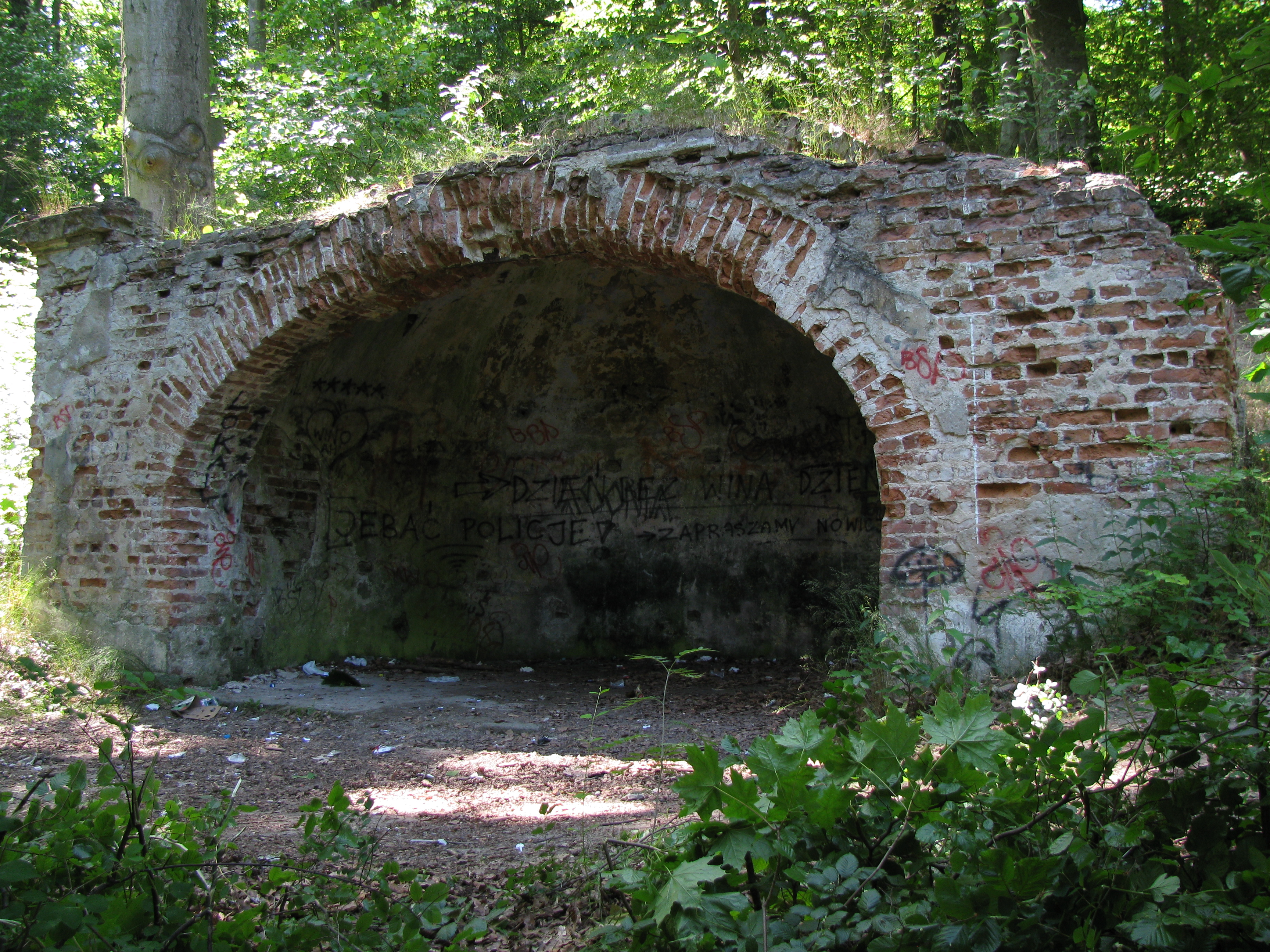 Gdańsk Oliwa, III Dwór - zabytkowa muszla.